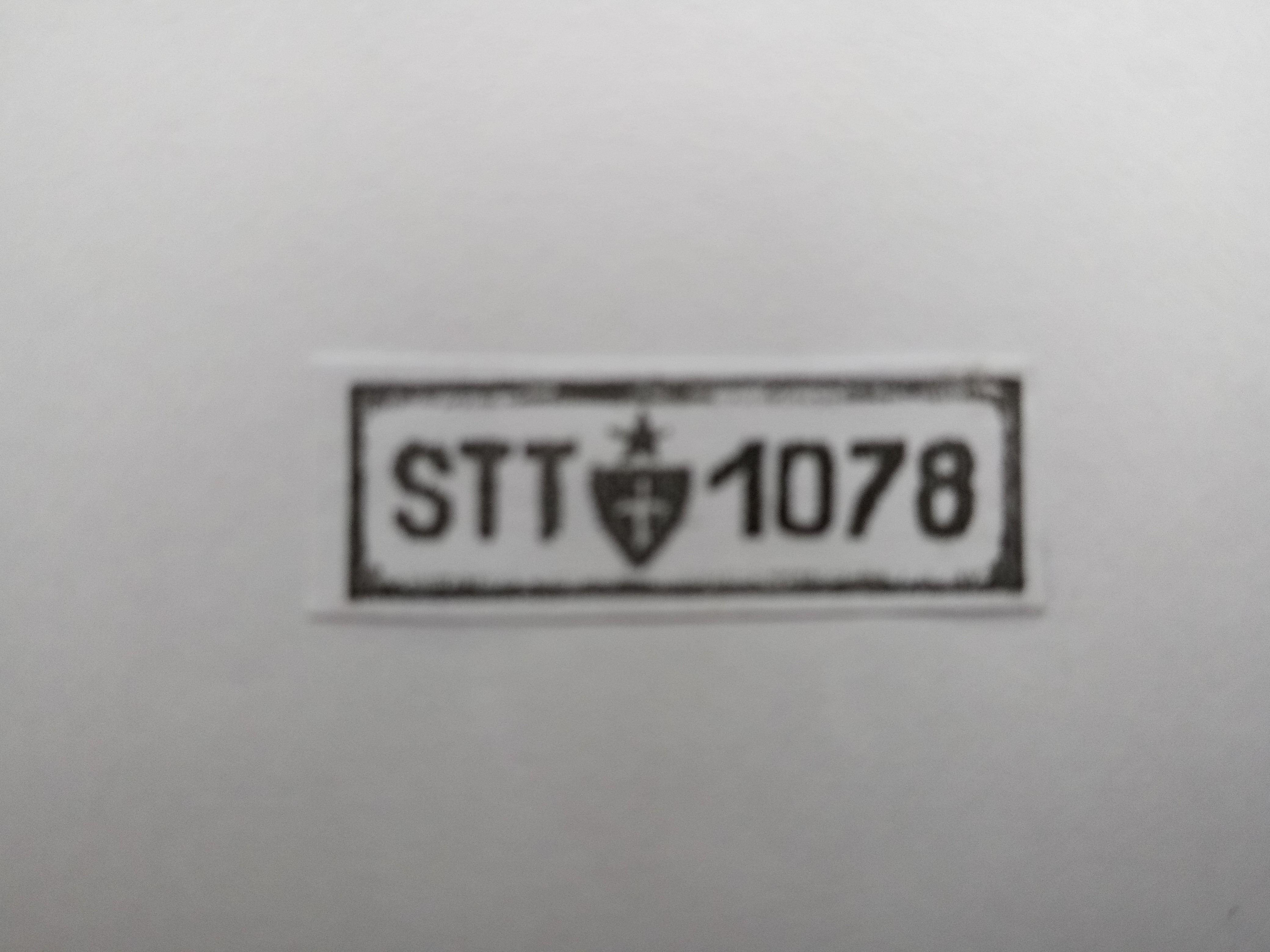 Targa TSS zona B 1947-1954